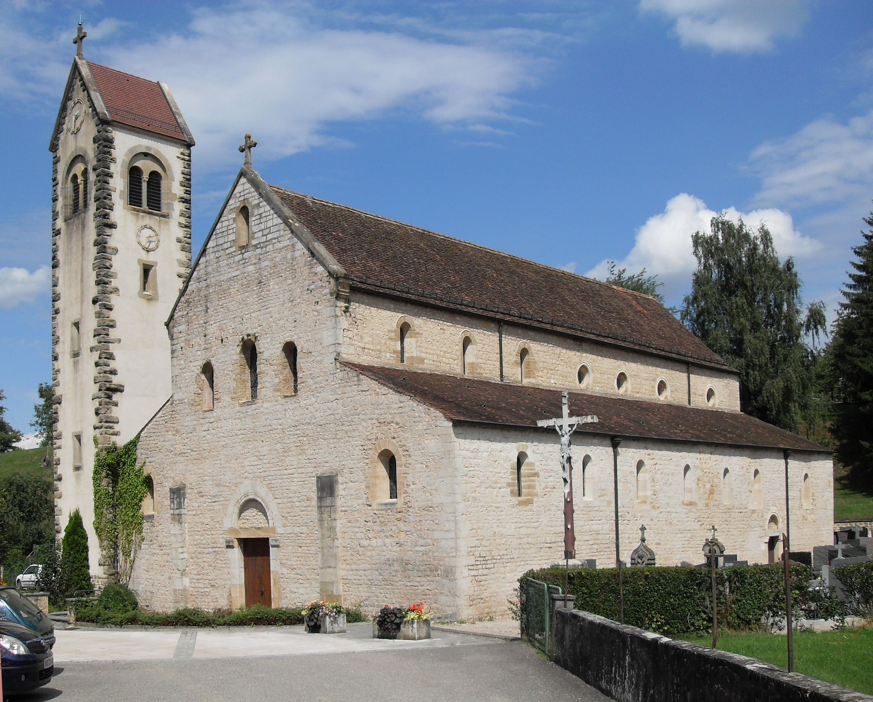 L'église Saint-Jacques-le-Mayeur à Feldbach